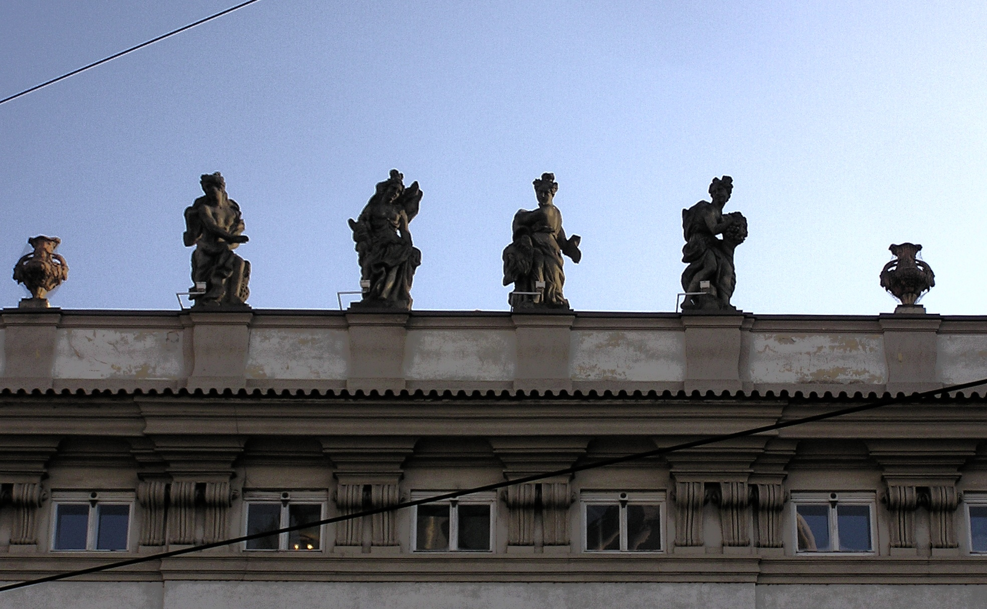 Atika Kaisersteinského paláce, Malostranské nám., Praha